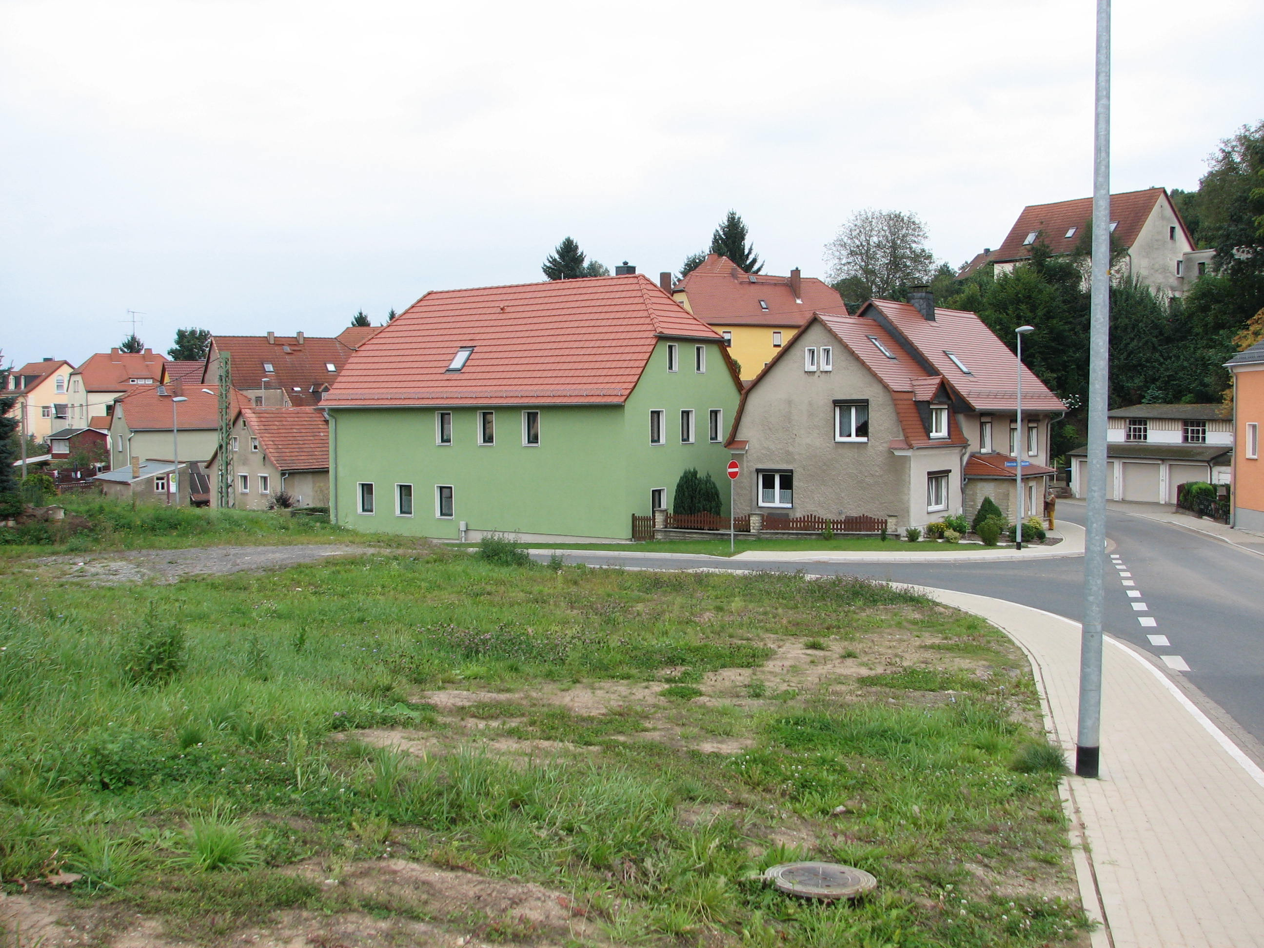 ehemaliges Ortszentrum Niederhermsdorfs an der Einmündung der Unter- in die Oberstraße, auf der Wiese befand sich vormals der Gasthof Niederhermsdorf samt einem Nebengebäude. 2008 wurden beide Häuser im Zuge der Straßenverbreiterung abgerissen. Zum Zeitpunkt der Aufnahme wurde nur im hinteren Teil (links neben dem abgebildeten Ort) wieder Wohnbebauung vorgenommen, die Wiese muss noch einige Jahre erhalten bleiben, da mit Fördermitteln abgerissen wurde.